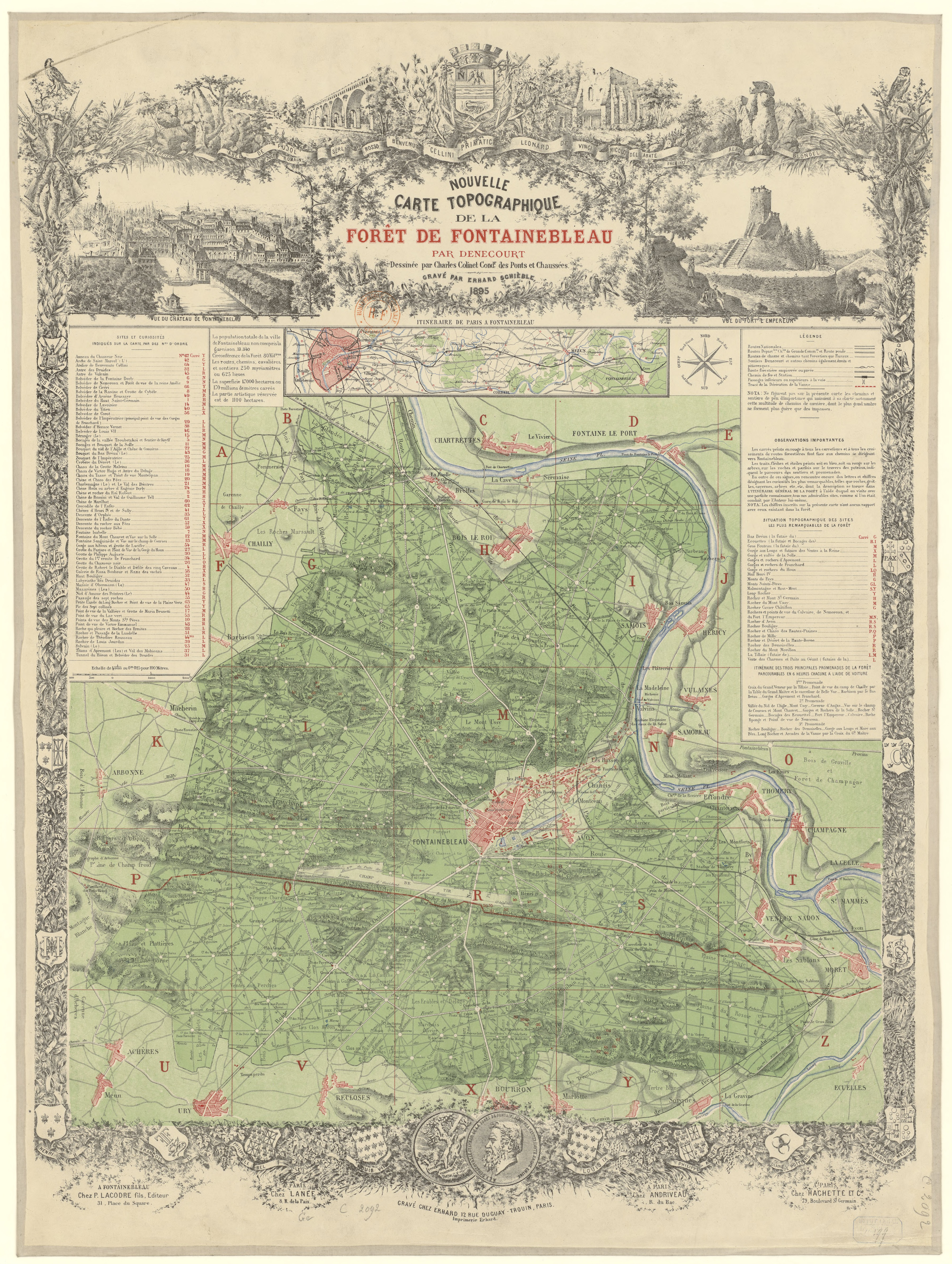 Forêt domaniale de Fontainebleau. Edition: P. Lacodre (Fontainebleau), 1895